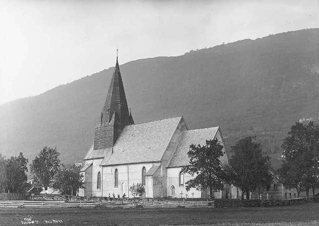 Voss kyrkje en: Voss church